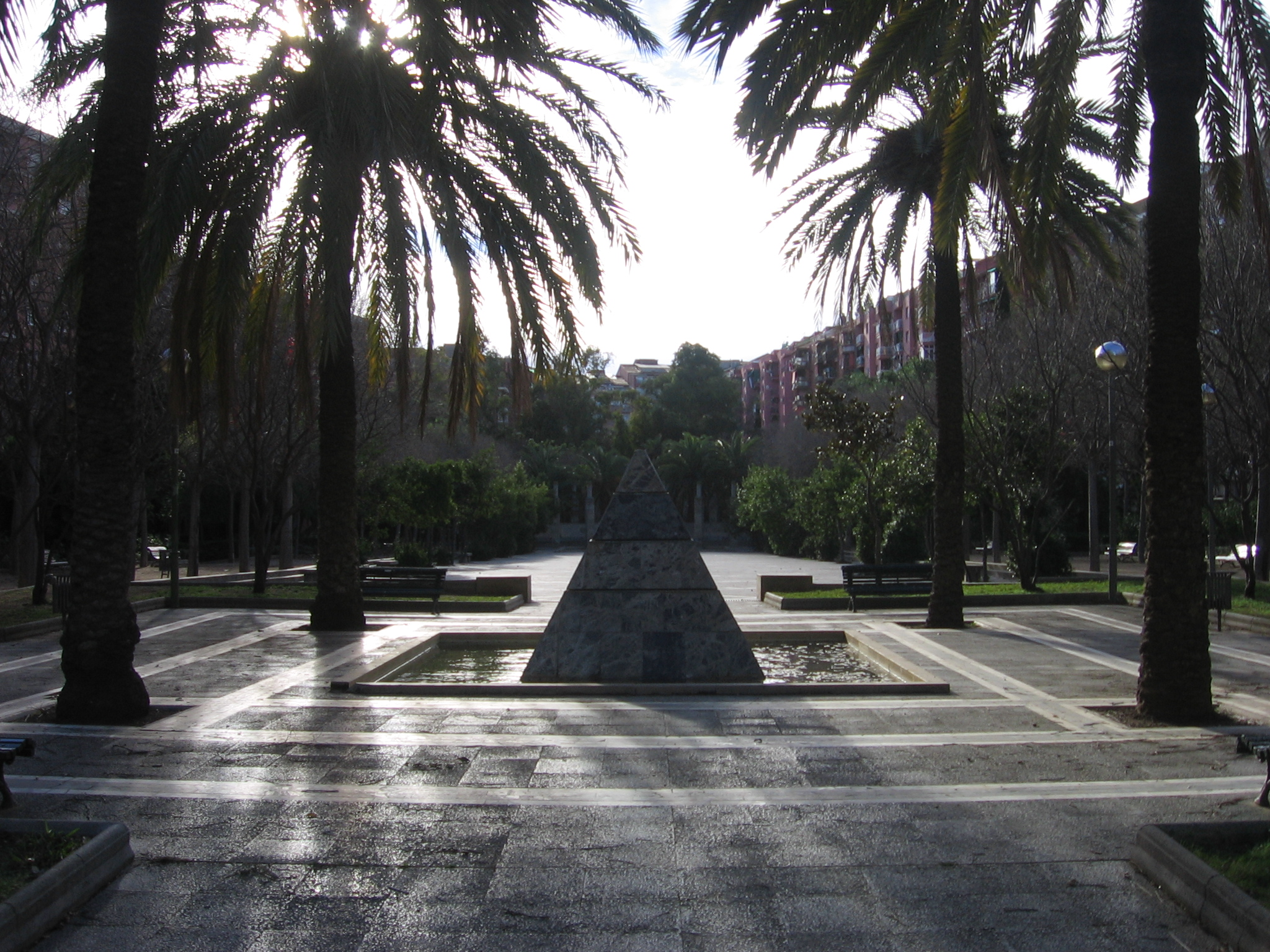 Parque de Can Sabaté.